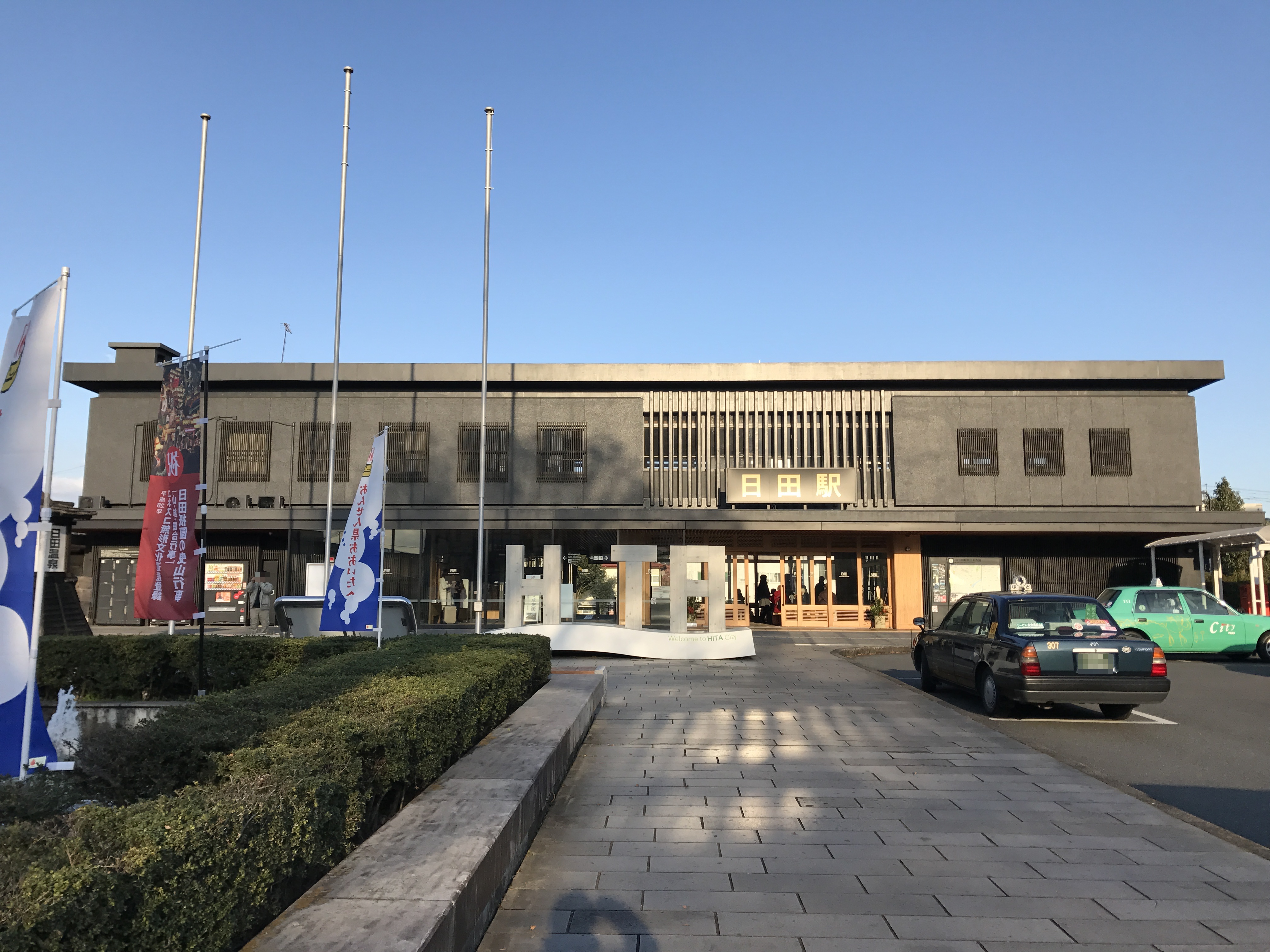 日田駅駅舎